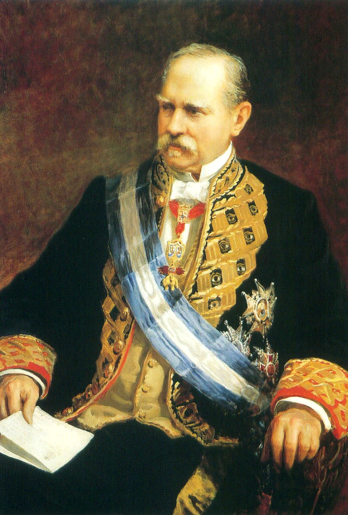 Retrato del político español José Elduayen Gorriti (1823-1898), que fue ministro de Hacienda durante el reinado de Amadeo I, ministro de Ultramar y ministro de Estado durante el reinado de Alfonso XII y nuevamente ministro de Estado y ministro de Gobernación durante la regencia de María Cristina de Habsburgo-Lorena.